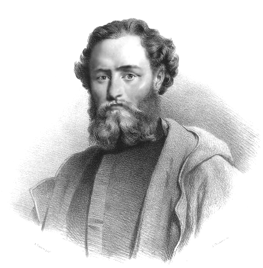 Ludwik Mierosławski